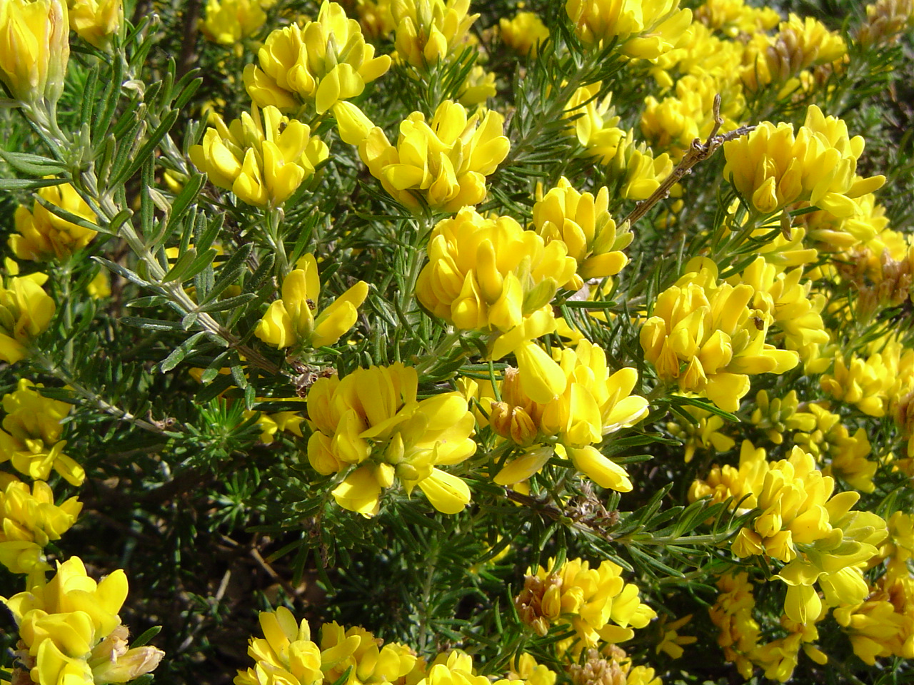 Teline linifolia, sin. Genista linifolia Ceuta, España